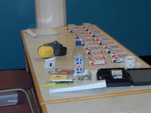 self taken